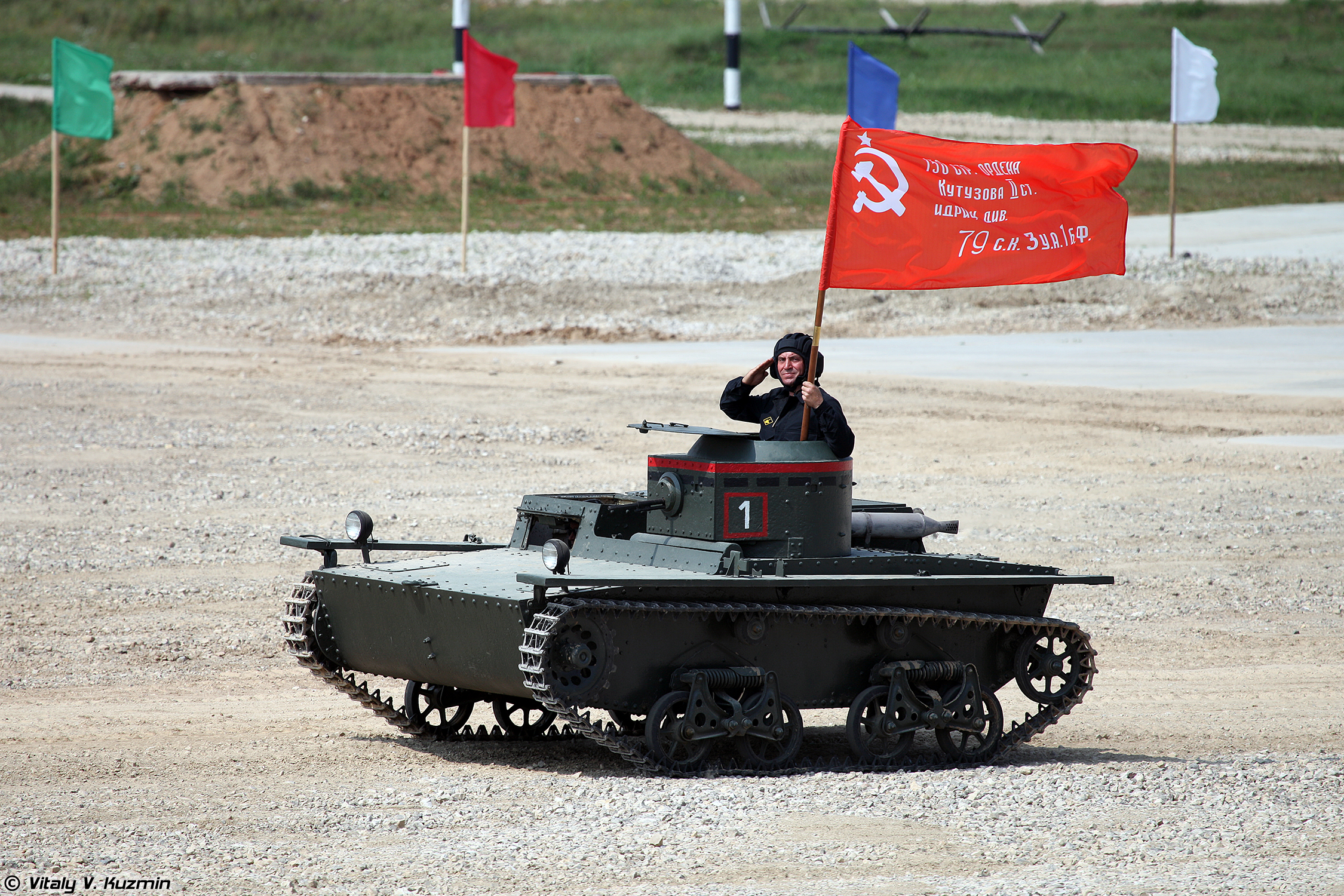 T-38